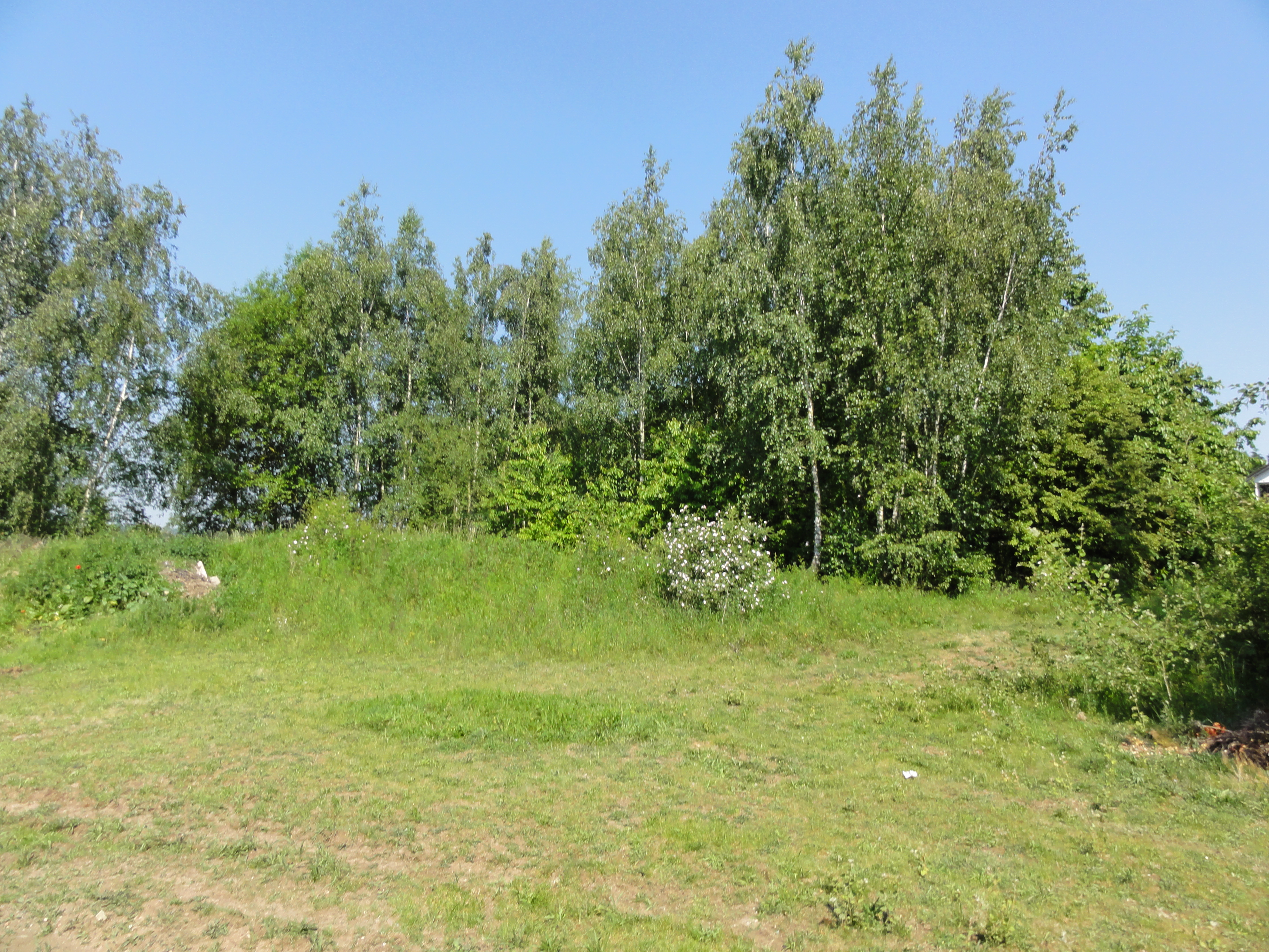 Terril n° 129 dit 2 d'Azincourt, fosse n° 2 de la Compagnie des mines d'Azincourt dans le bassin minier du Nord-Pas-de-Calais, Erchin, Nord, Nord-Pas-de-Calais, France.